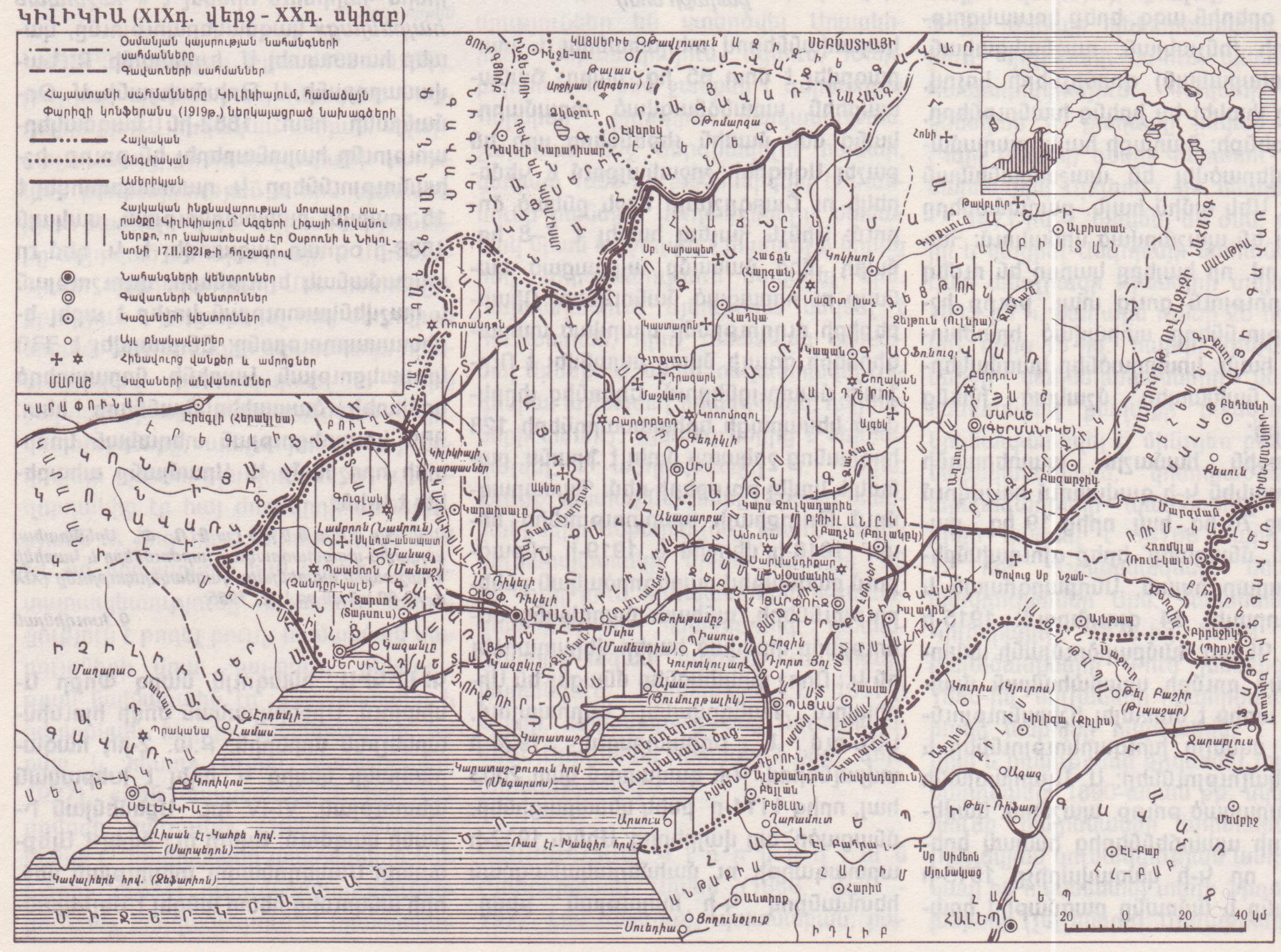 Կիլիկիայի Հայկական Մարզ (XIX դ. վերջ - XX դ. սկիզբ)